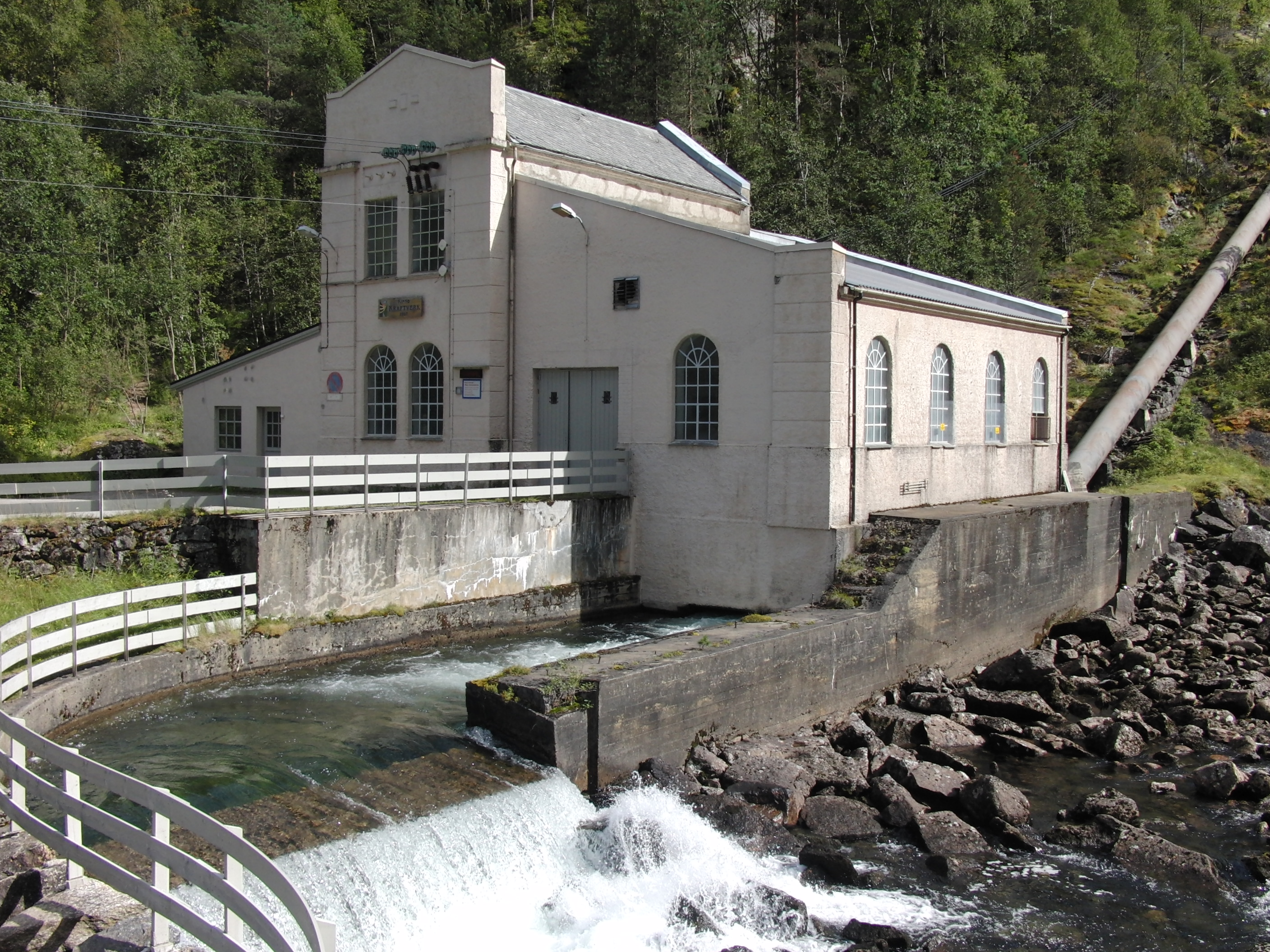 Kinso kraftverk